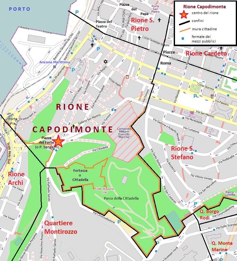 Mappa del rione Capodimonte di Ancona, con i confini, le vie, le piazze e i parchi.